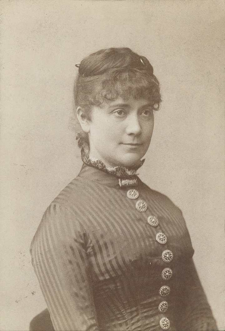 portrett, kvinne, skuespillerinne, brystbilde.